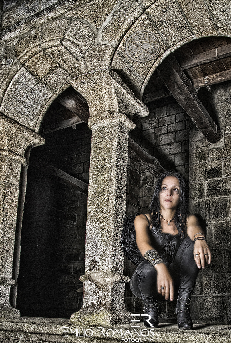 Fotosesión de Rochi Nóvoa Vázquez para Farraos de Boneca